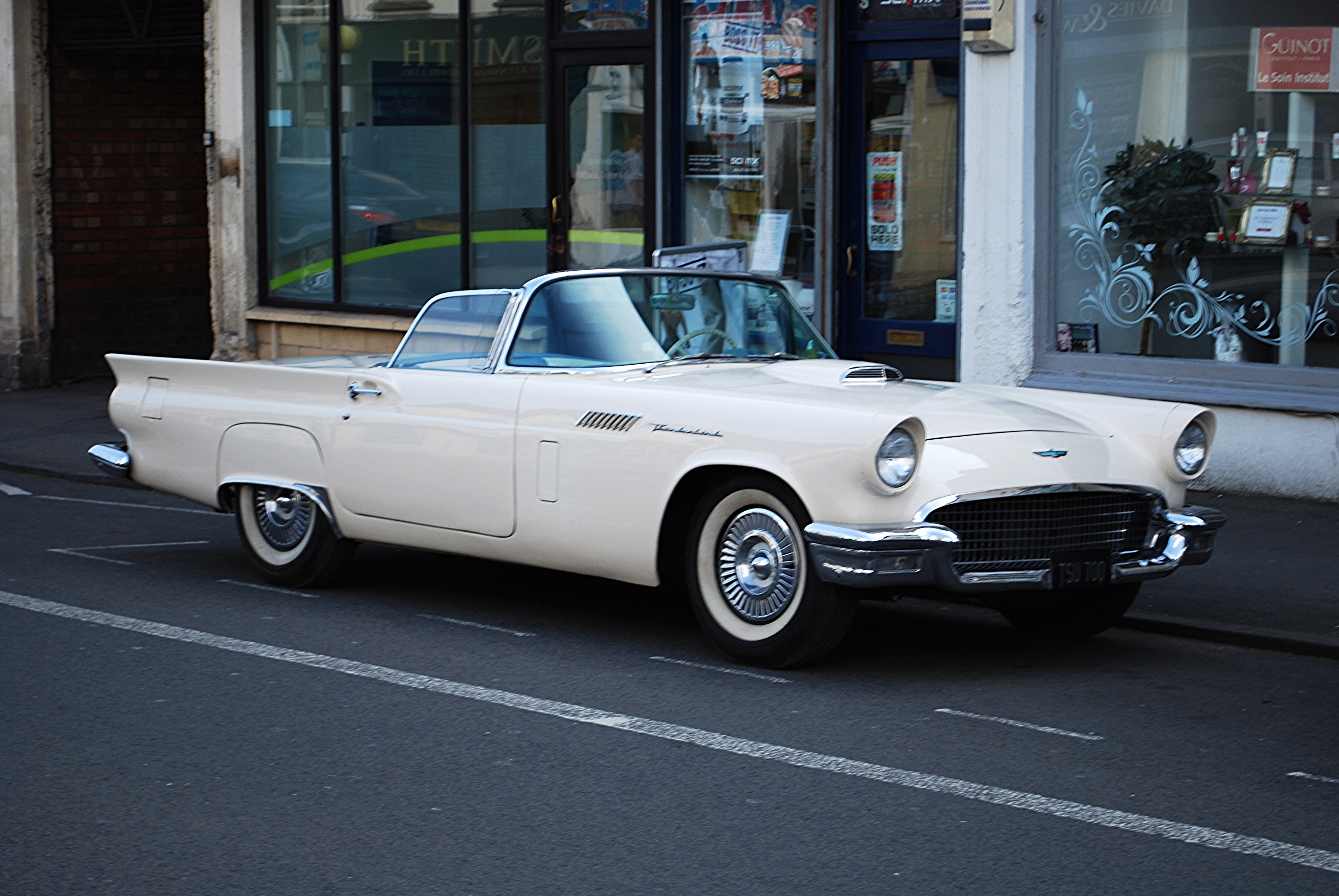 1957 Ford Thunderbird at Keynsham, 28 September 2015.